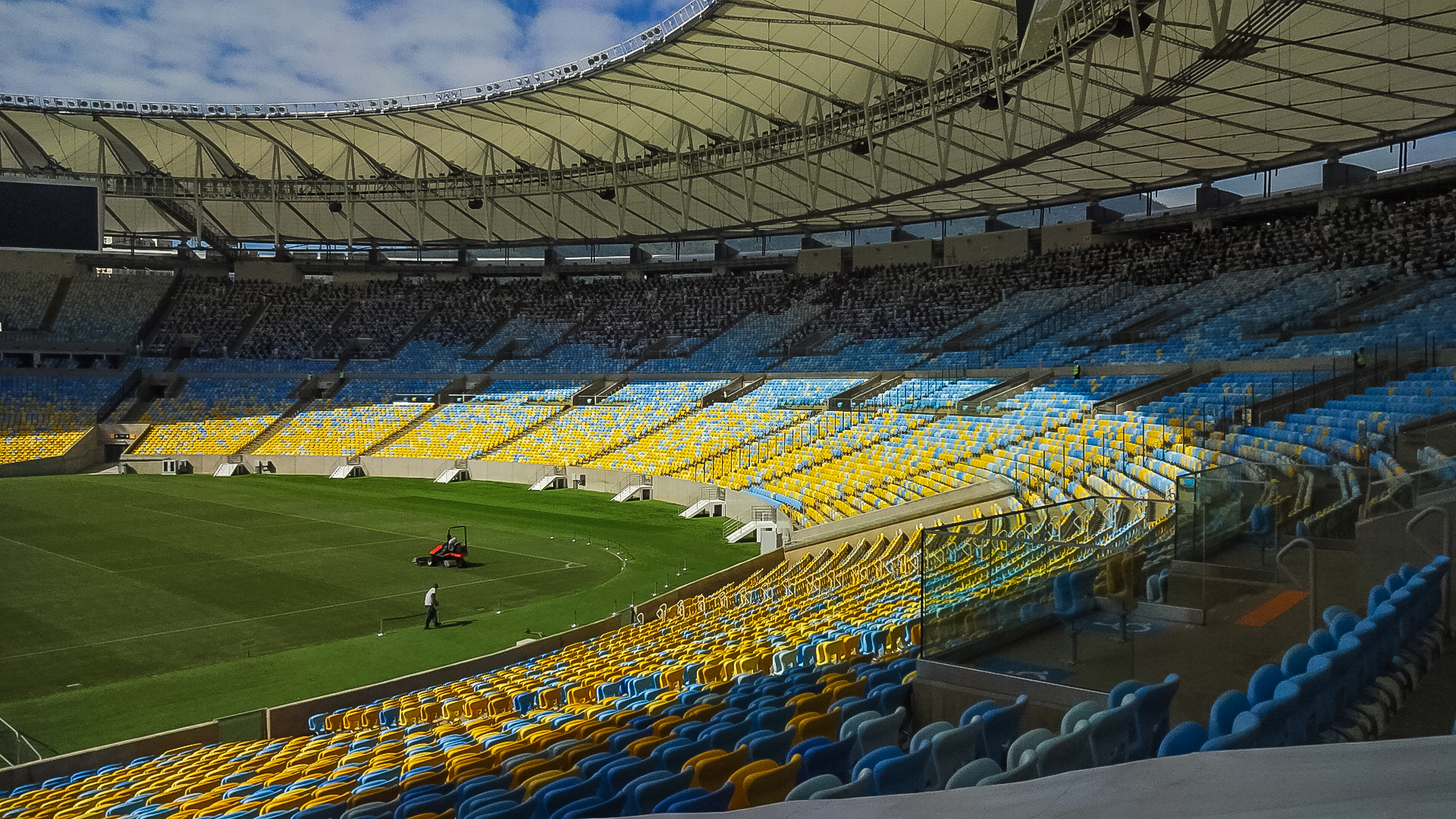 Estádio Mário Filho, conhecido como Estádio Maracanã